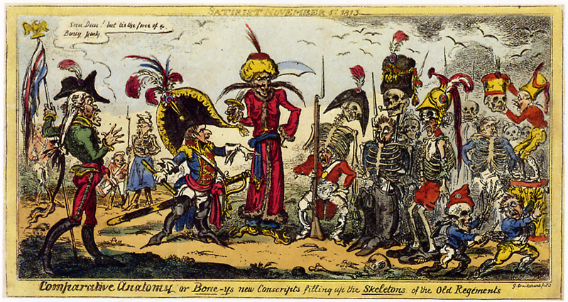 Napoleon bei Zwangsrekrutierungen: Die neuen Soldaten müssen in die Skelette ihrer gefallenen Vorgänger klettern und werden selber zu Gebein. "Skeleton" in der Bildunterschrift ist ein Wortspiel; es bedeutet sowohl "Stammtruppe" als auch "Skelett"